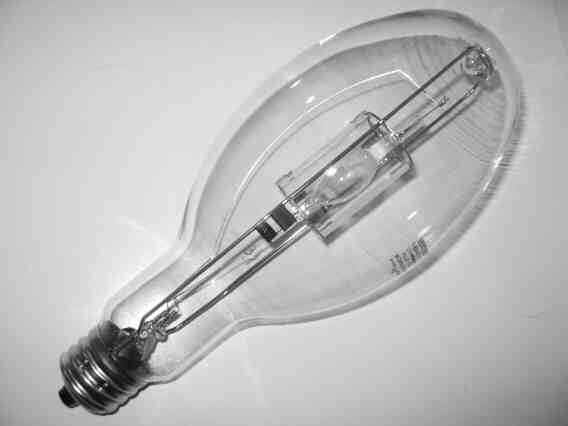 Lamp zelf gefotografeerd